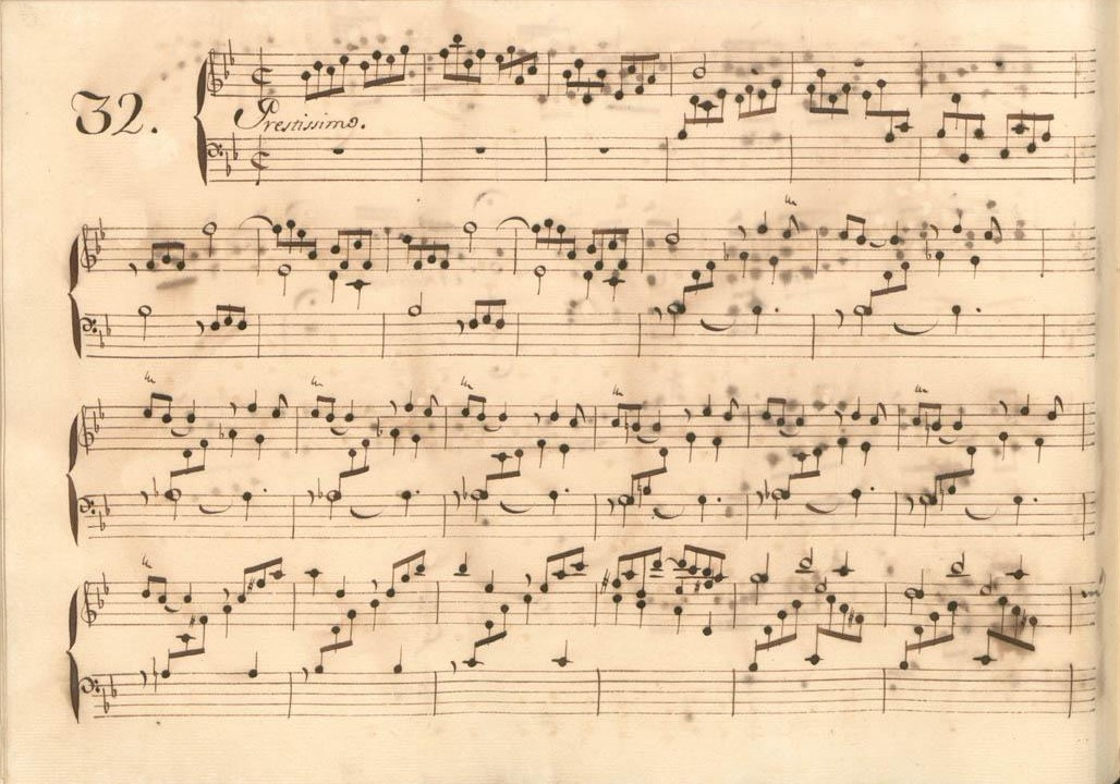 La sonate K. 545, telle qu'elle se présente dans le manuscrit de Parme, volume XV no. 32.